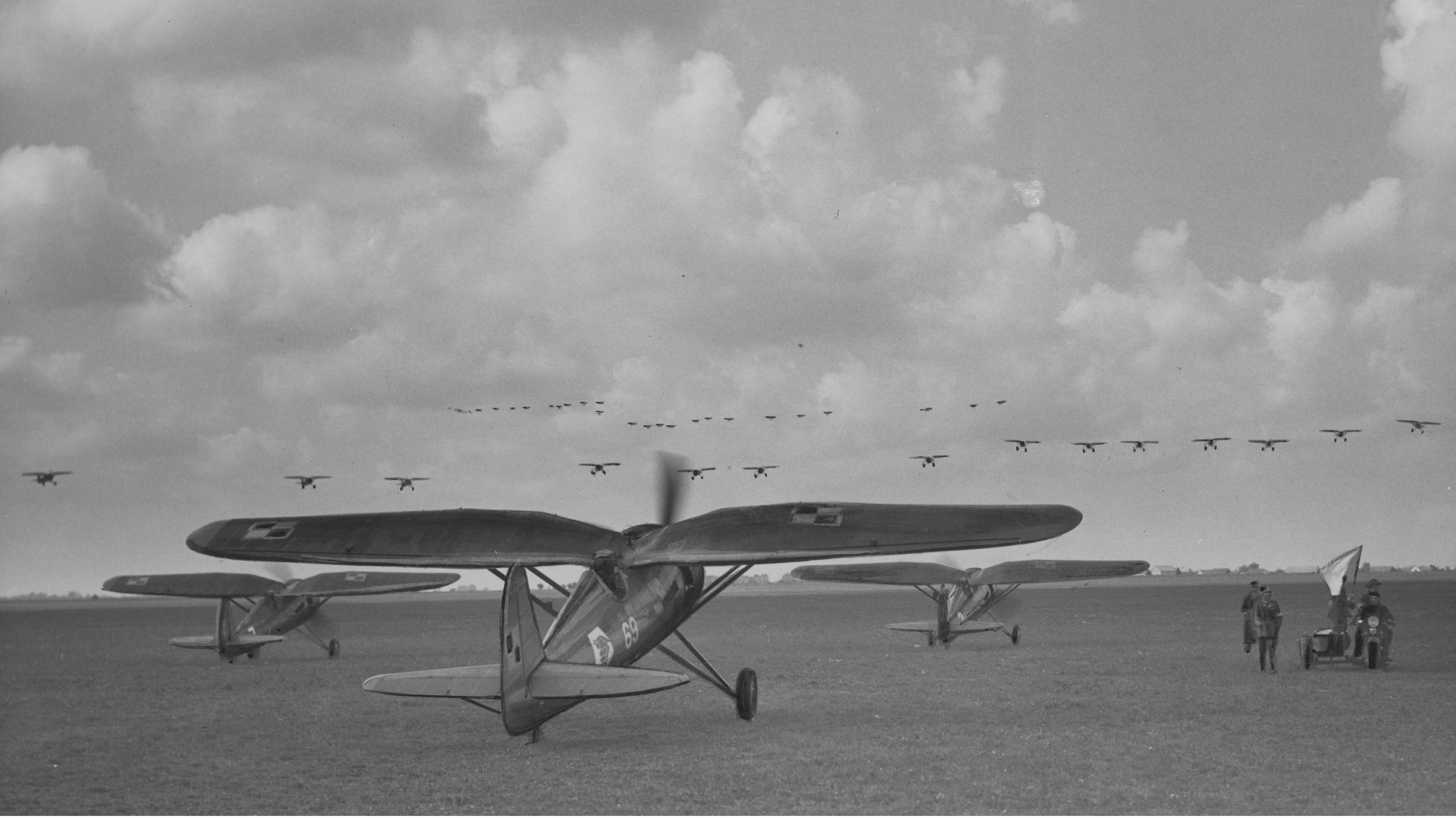 Pokazy lotnicze na lotnisku Okęcie w Warszawie - samolot ze 141 eskadry myśliwskiej 4 pułku lotniczego przed startem. Koncern Ilustrowany Kurier Codzienny - Archiwum Ilustracji. Sygnatura: 1-W-1599-1